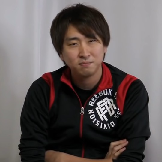 きまぐれクック かねこ 本人